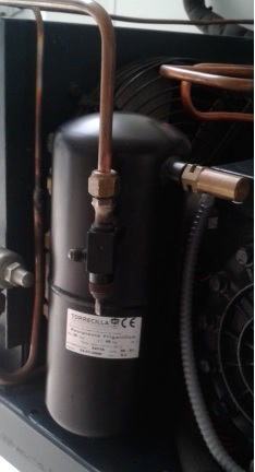 Recipiente de líquido (Refrixeración)